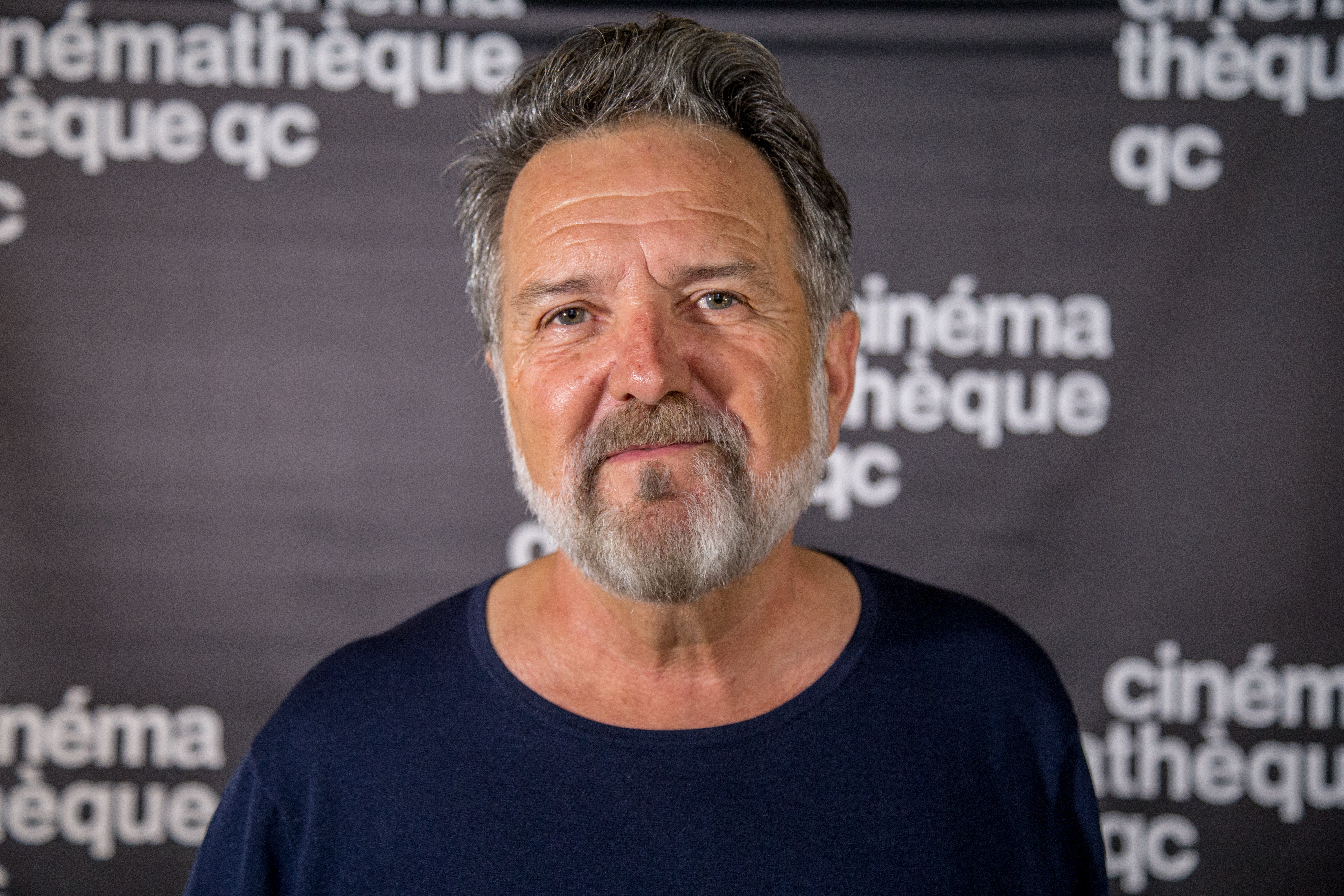 Portrait du réalisateur et producteur Michel Poulette réalisé lors de la soirée d'ouverture du cycle Femmes, Femmes à la Cinémathèque québécoise.